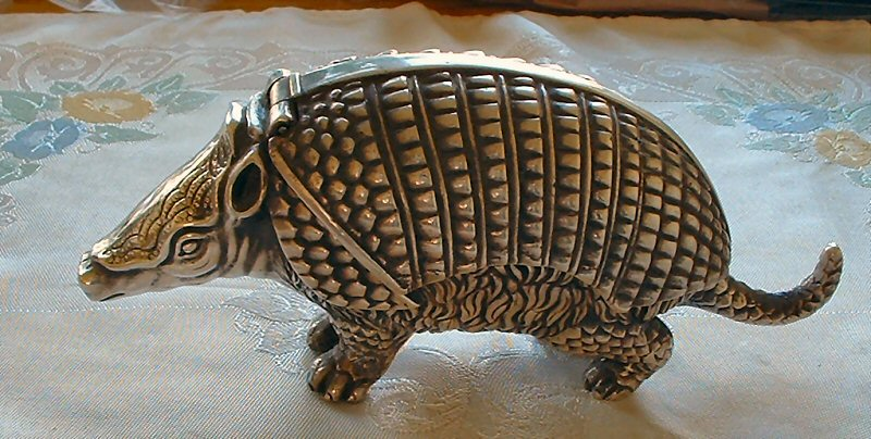 Silver armadillo inkwell